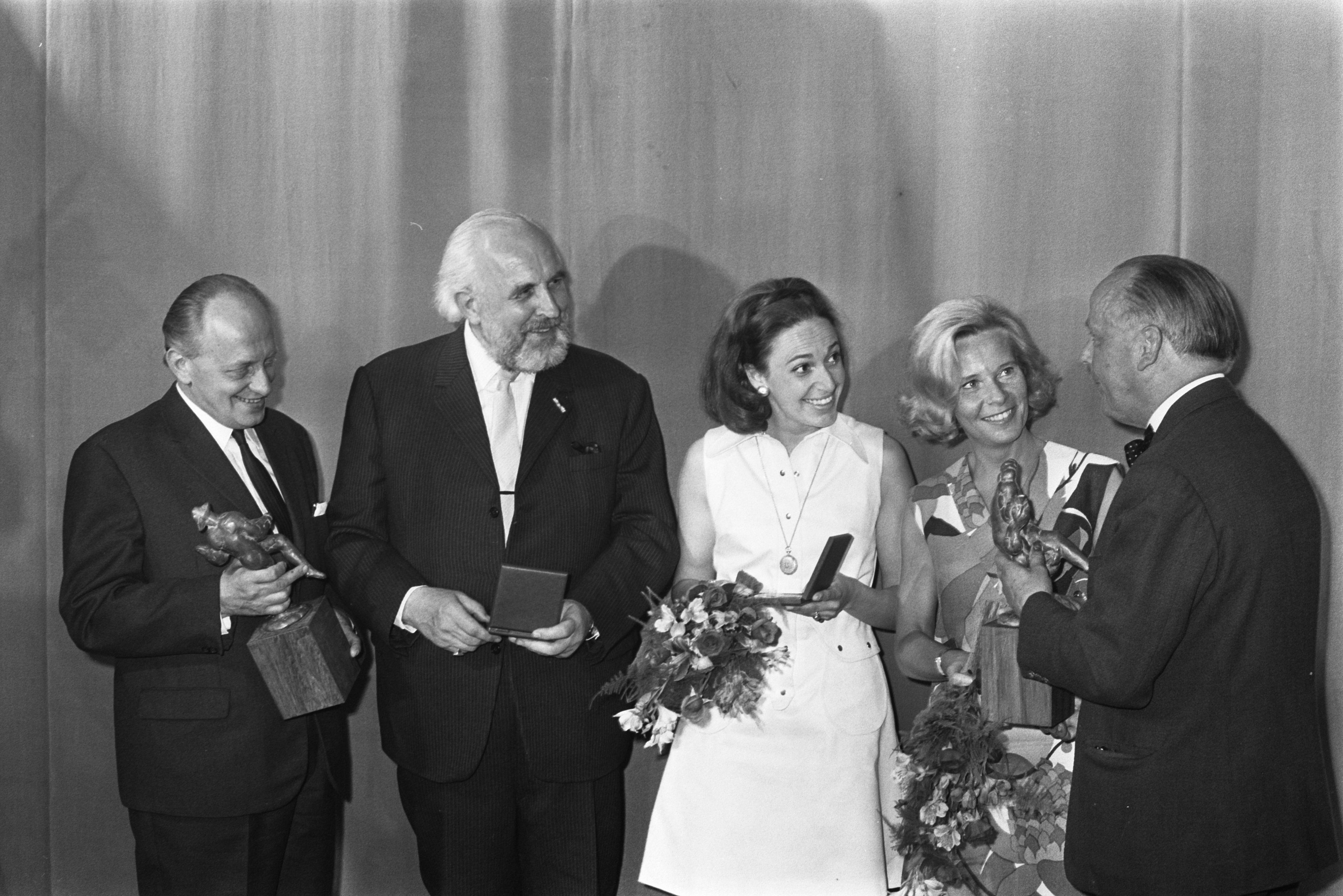 Jaarlijkse toneelprijzen Den Haag H.J. Reinink (voorz. Holland Festival ) reikte prijzen uit aan v.d. Made (Arlecchino), Tiemijer ( Louis d"Or ). Arlecchino + Louis & Theo d’Or 1969: Sacco van der Made, Hans Tiemeyer, Trins Snijders, Kitty Janssen